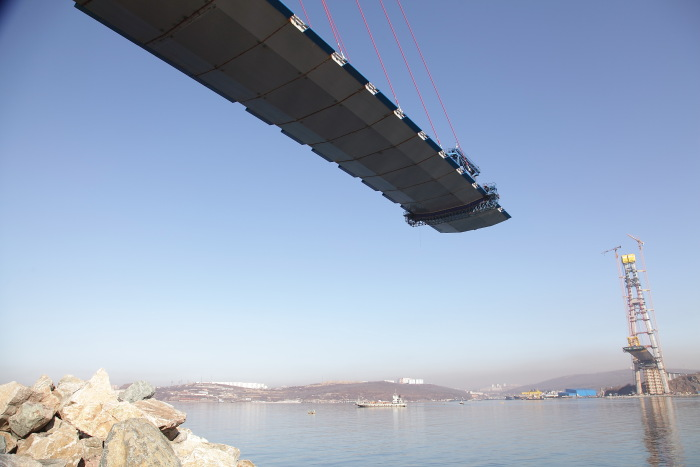 Строительство моста на остров русский 10.11.2011